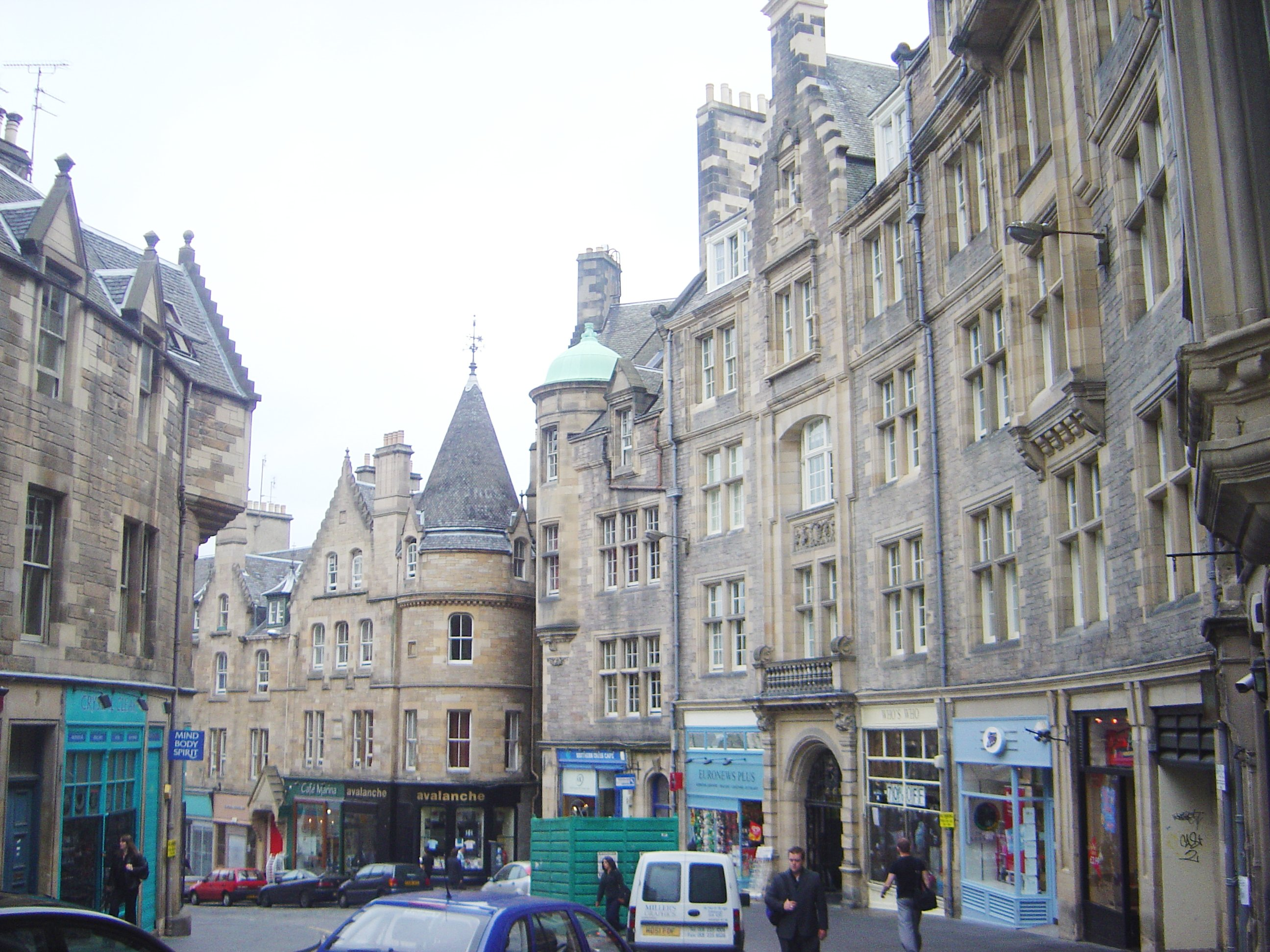 Cockburn Street in Edinburgh